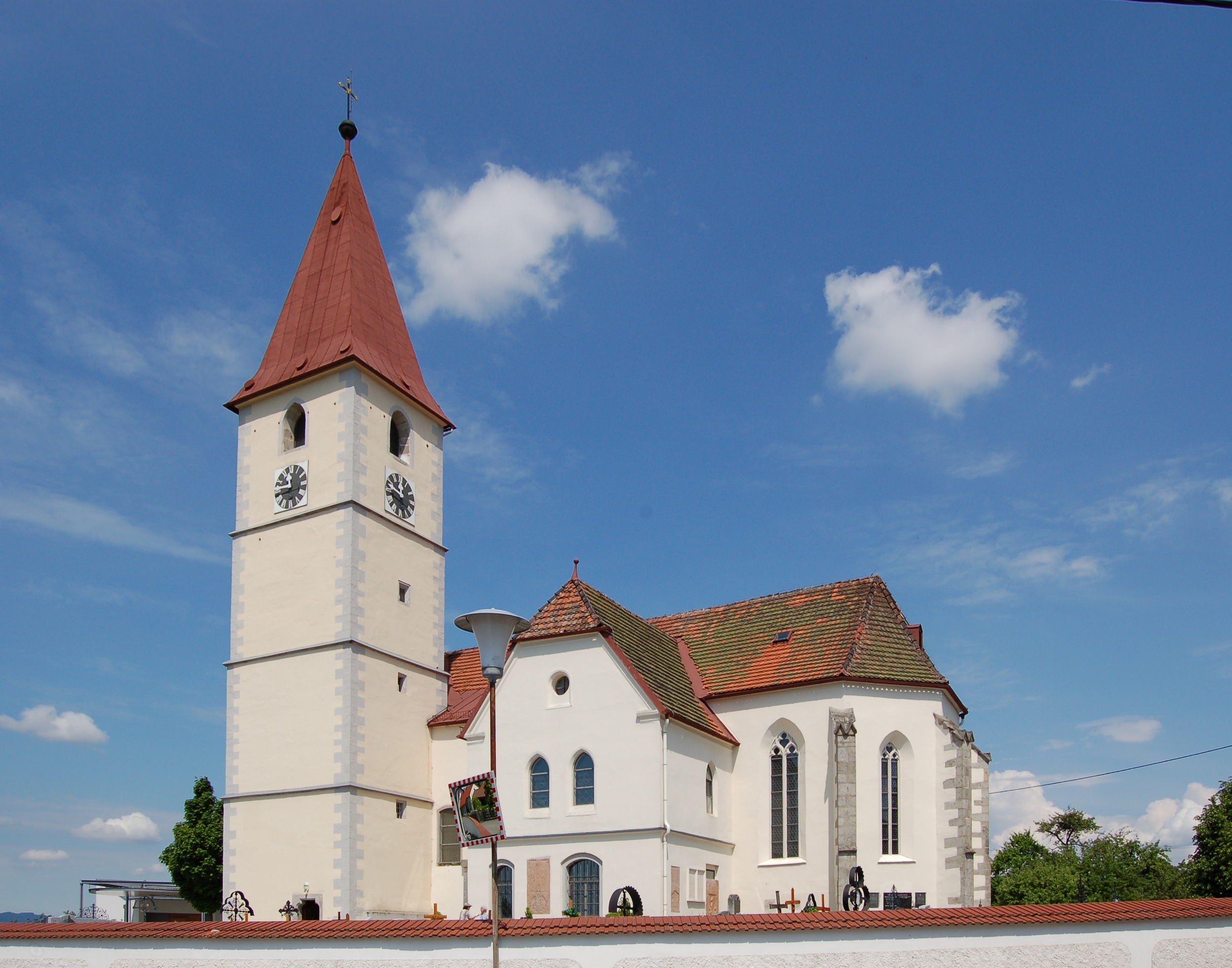 Die denkmalgeschützte Pfarrkirche in Kleinzell im Mühlkreis (Oberösterreich).